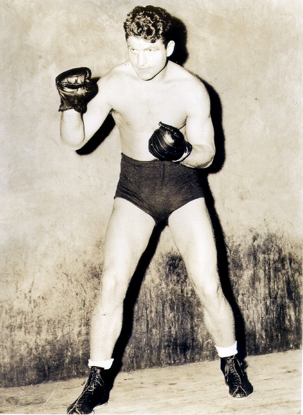 Arturo Godoy (Iquique, 10 de octubre 1912 - † Iquique, 27 de agosto de 1986) boxeador chileno.